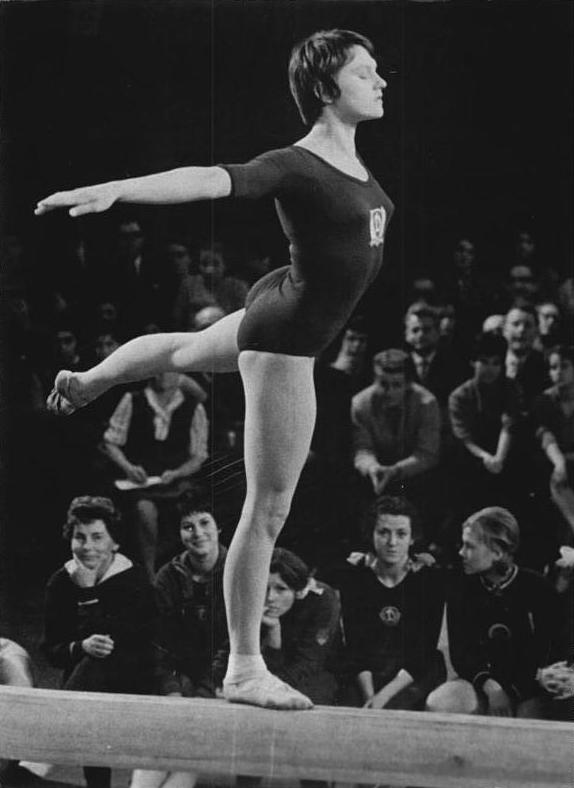 Birgit Radochla Zentralbild 4.12.1961 Birgit Radochla Überraschungsmeisterin Mit einem Überraschnungssieg der erst 16jährigen Berliner Dynamo-Sportlerin klangen am 3.12.1961 im Saal des Eisenacher Hotels "Zur Wartburgstadt" die Deutschen Frauen-Turnmeisterschaften im Olympischen Achtkampf aus. UBz: Die neue Deutsche Meisterin Birgit Radochla auf dem Schwebebalken.